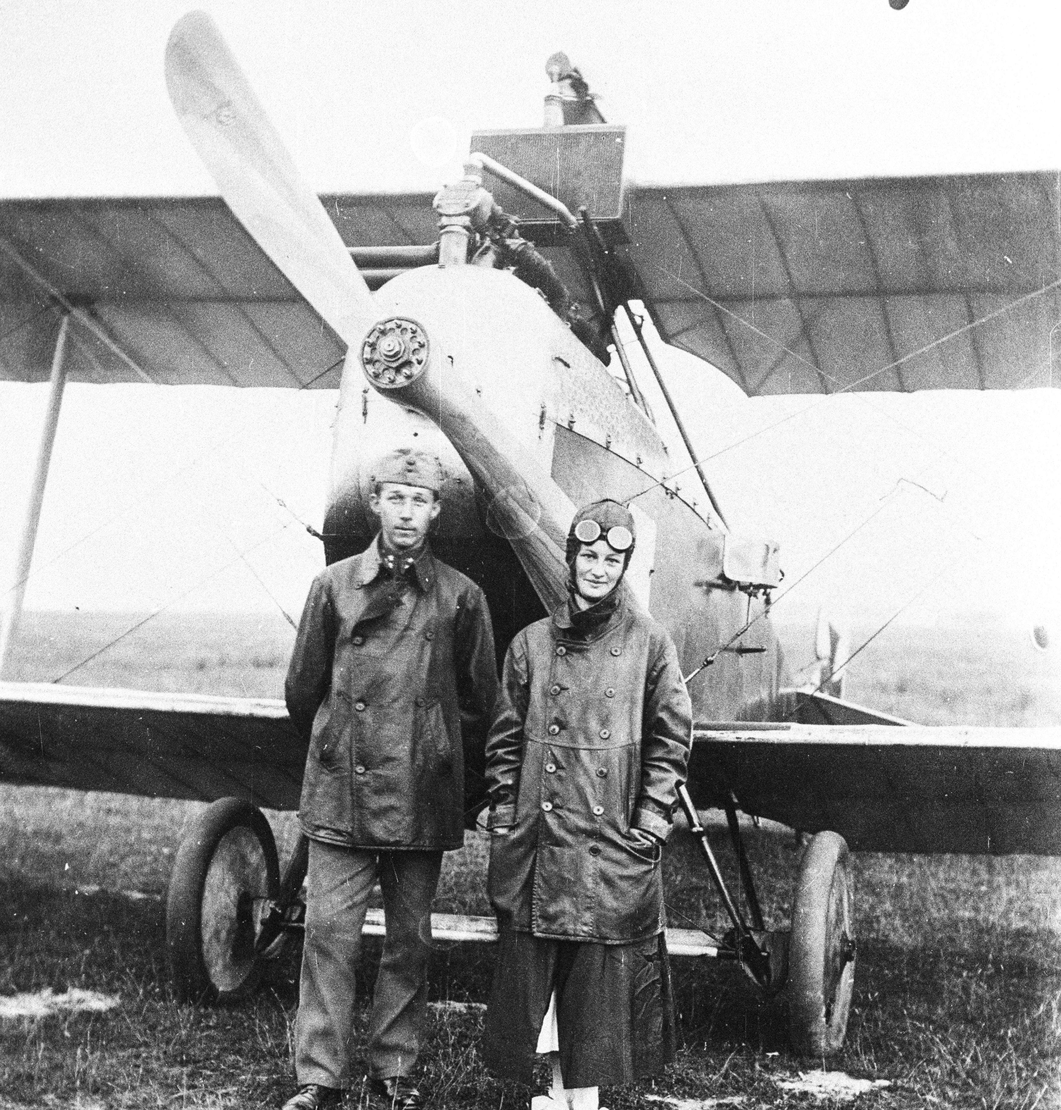 Branderburg C.I típusú felderítő repülőgép. Tags: airplane, airport, transport, pilot, First World War, military, Hansa-Brandenburg-brand, Austrian brand, biplane Title: Branderburg C.I típusú felderítő repülőgép.